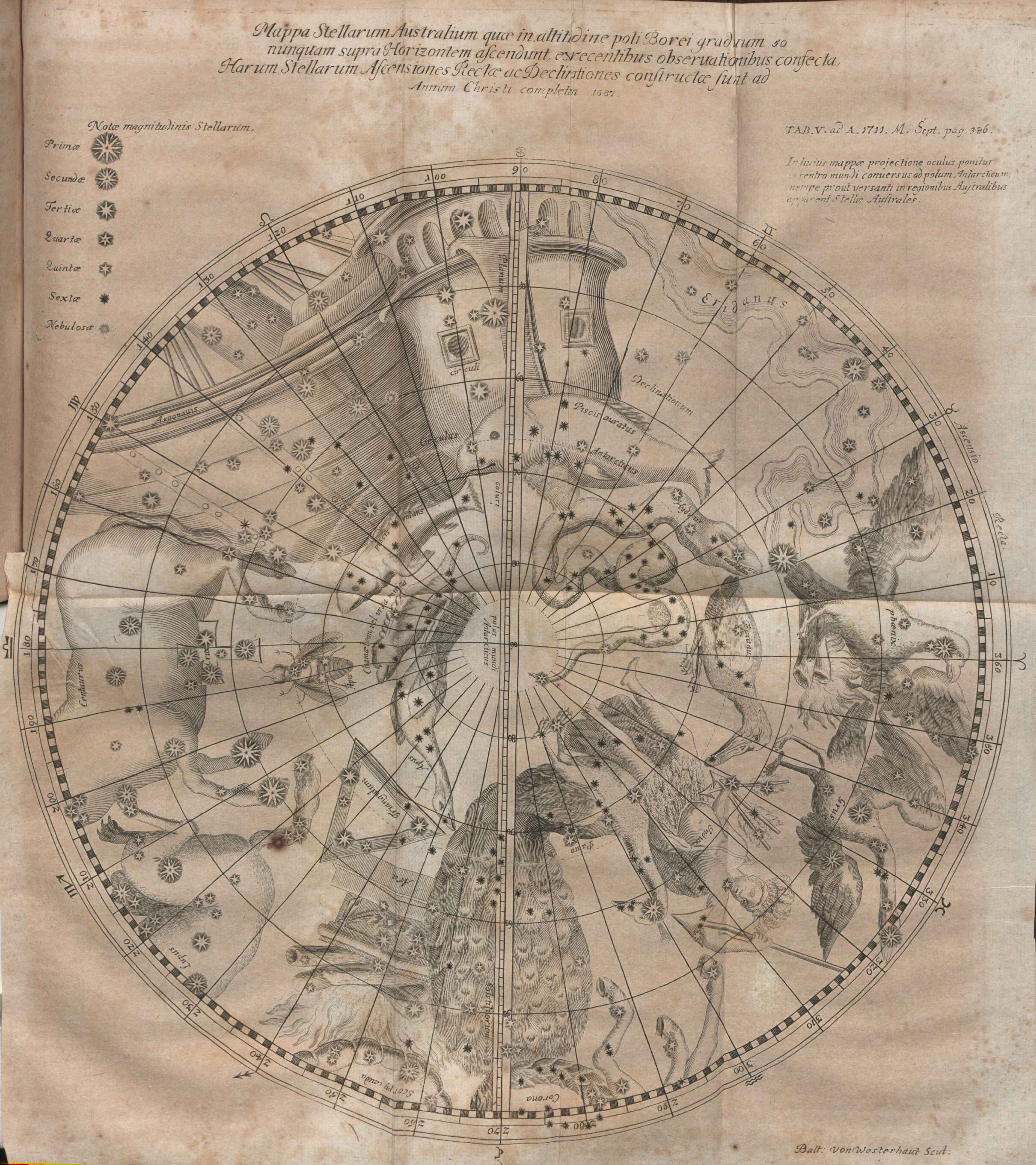 Illustration